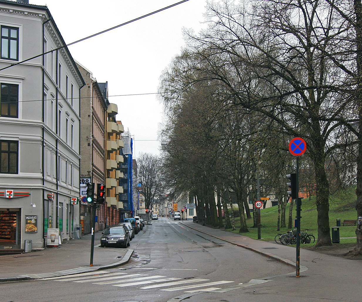 Sporveisgata, Oslo, sett fra Thereses gate